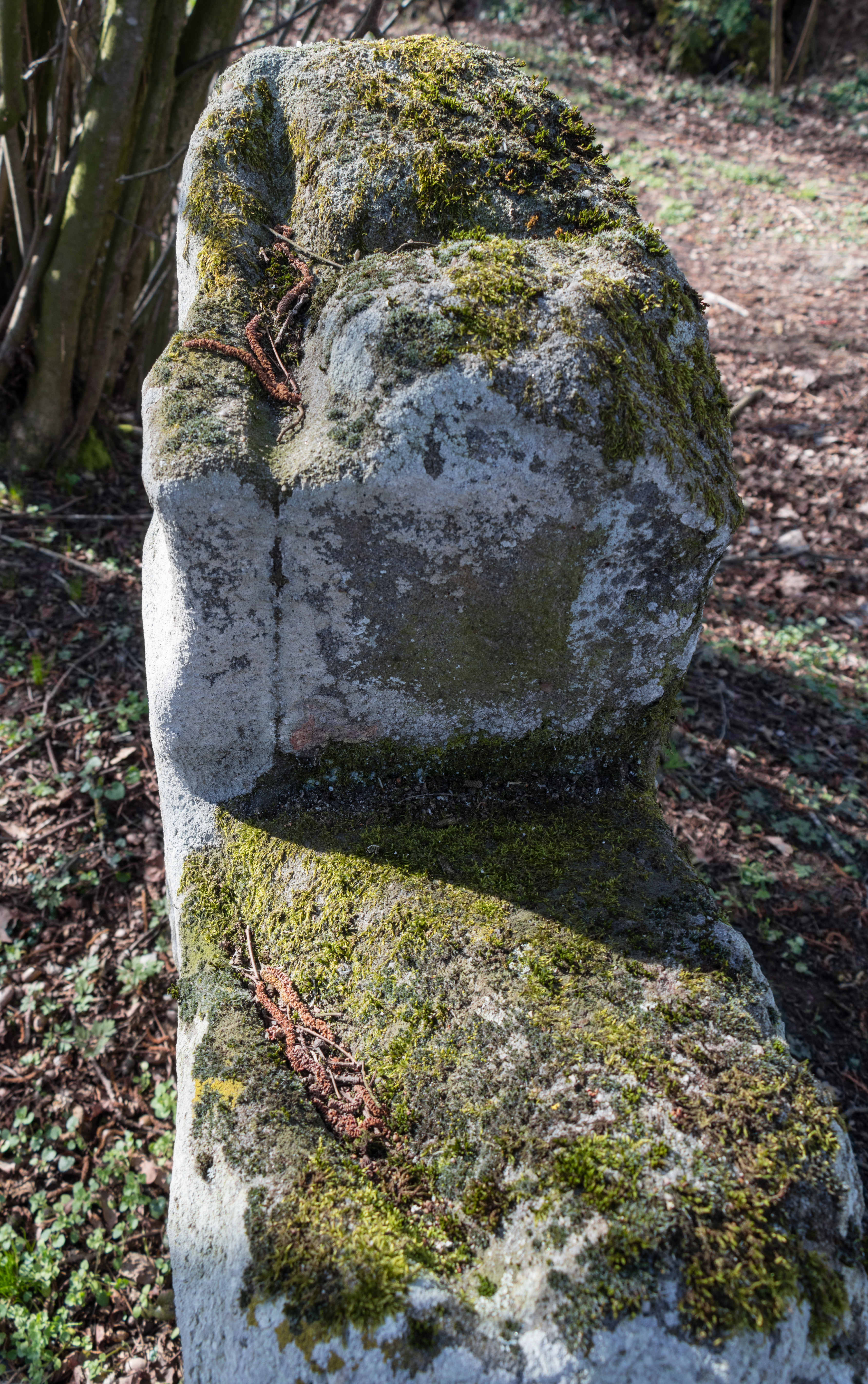 Steinkreuz, Richthof, Freystadt, Baudenkmal, Wetzrillen